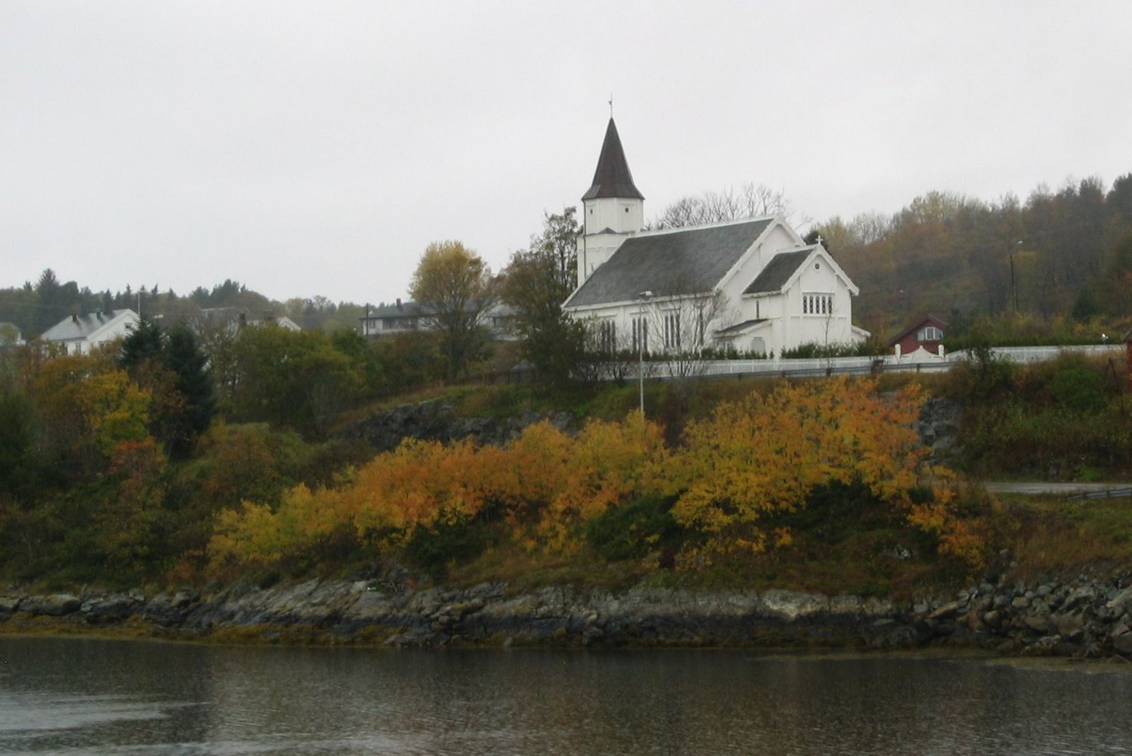 Sandstad church, Sandstad, Hitra, Sør-Trøndelag, Norway